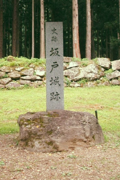 Site of Sakado Castle, Minamiuonuma, Niigata, Japan